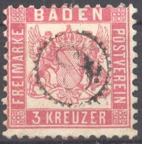 Uhrradstempel - hier Nr. 8. auf Baden/3 Kreuzer - waren Poststempel, die ab 1859 in Baden eingesetzt wurden.